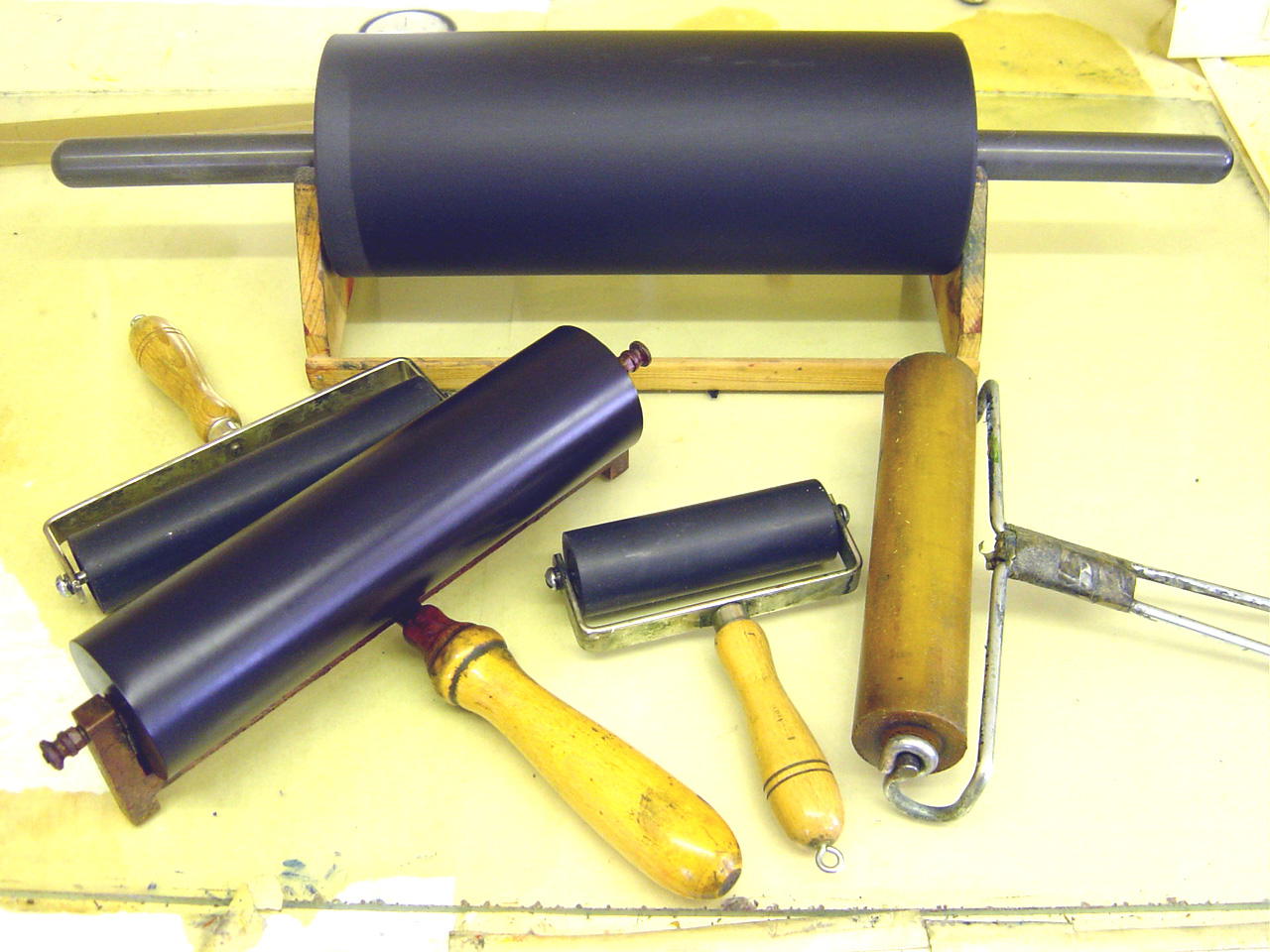 Intaglio printmaking — rollers